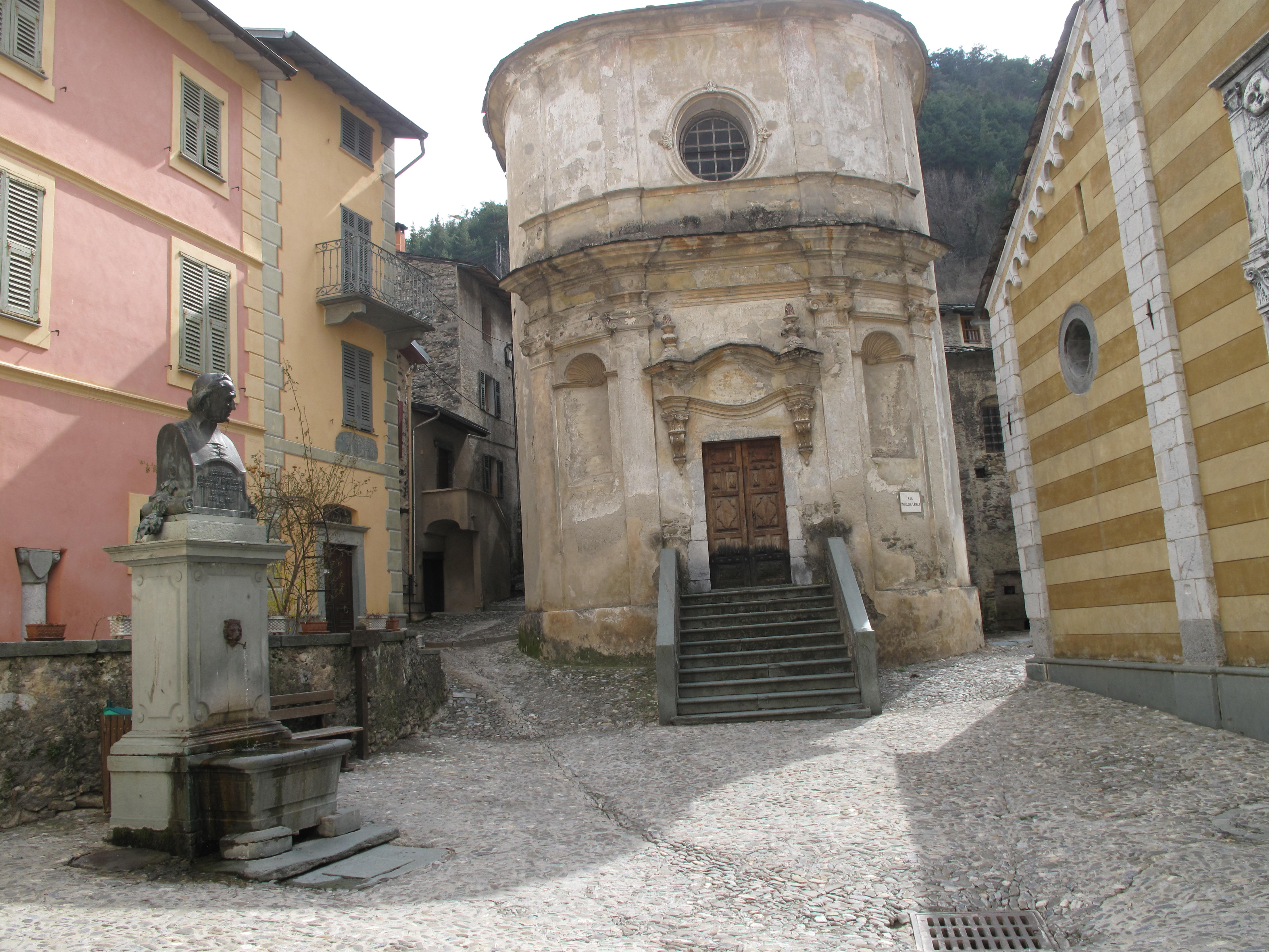 Chapelle des Pénitents Blancs, la Brigue, Alpes-Maritimes, France.